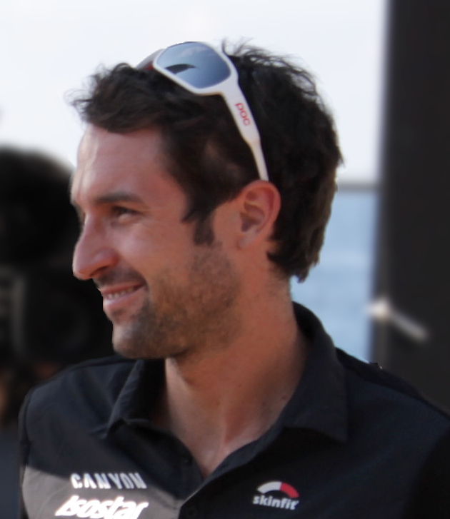 Boris Stein, Ironman France . Nice 2015